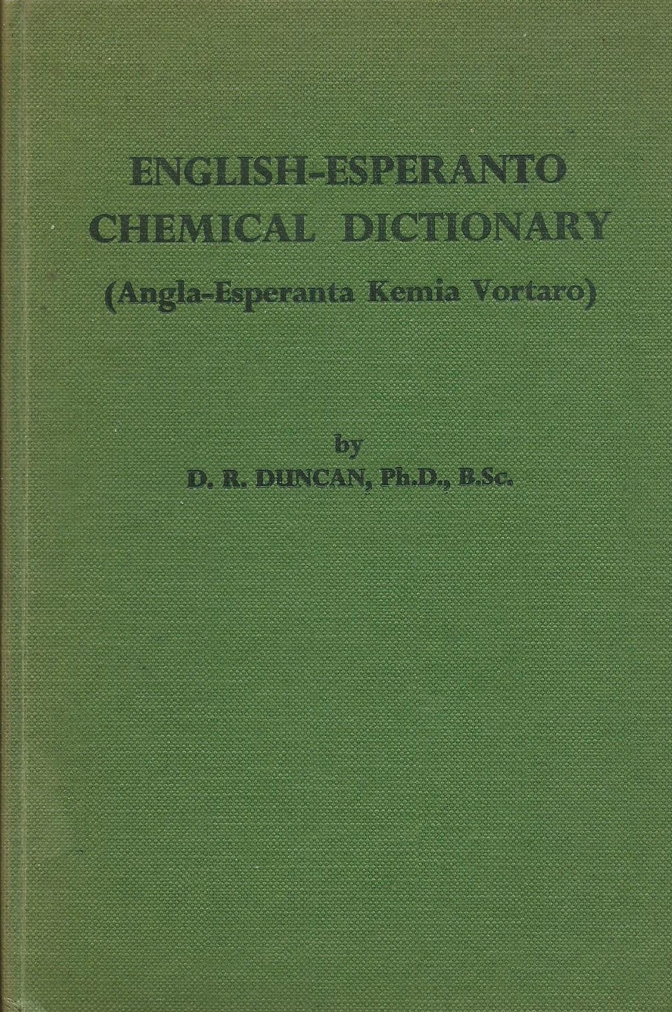 librokovrilo de "English-Esperanto Chemical Dicionary", 1956